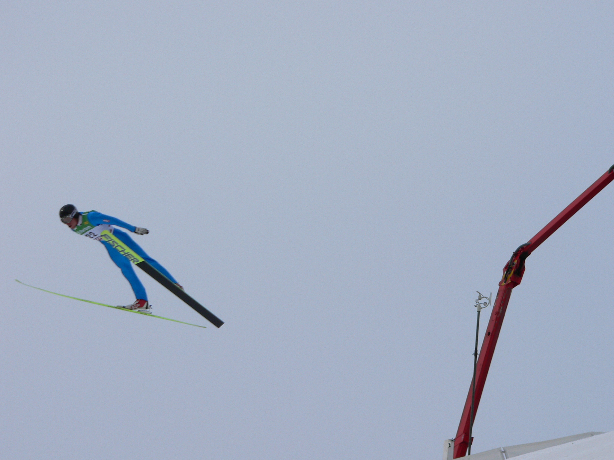 Nicolas Bal, Holmenkollbakken, 2005